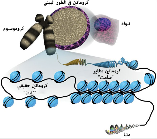 بنية وتنظيم الكروماتين